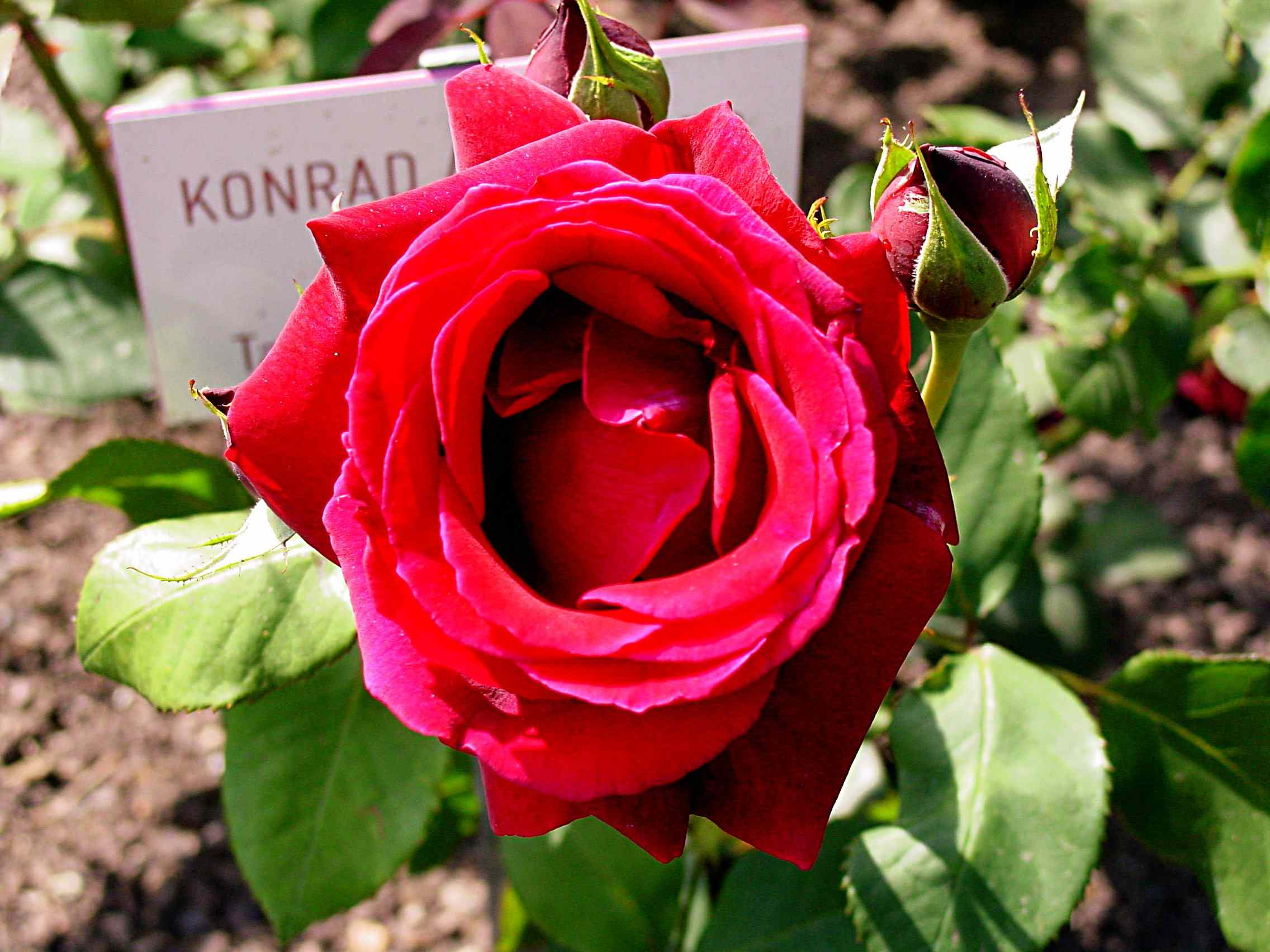 Konrad Adenauer